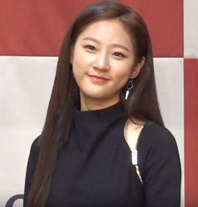 TV조선 특별기획 드라마 '레버리지: 사기조작단' 제작발표회가 10일 오후 서울 구로구 신도림 라마다호텔 열렸다.